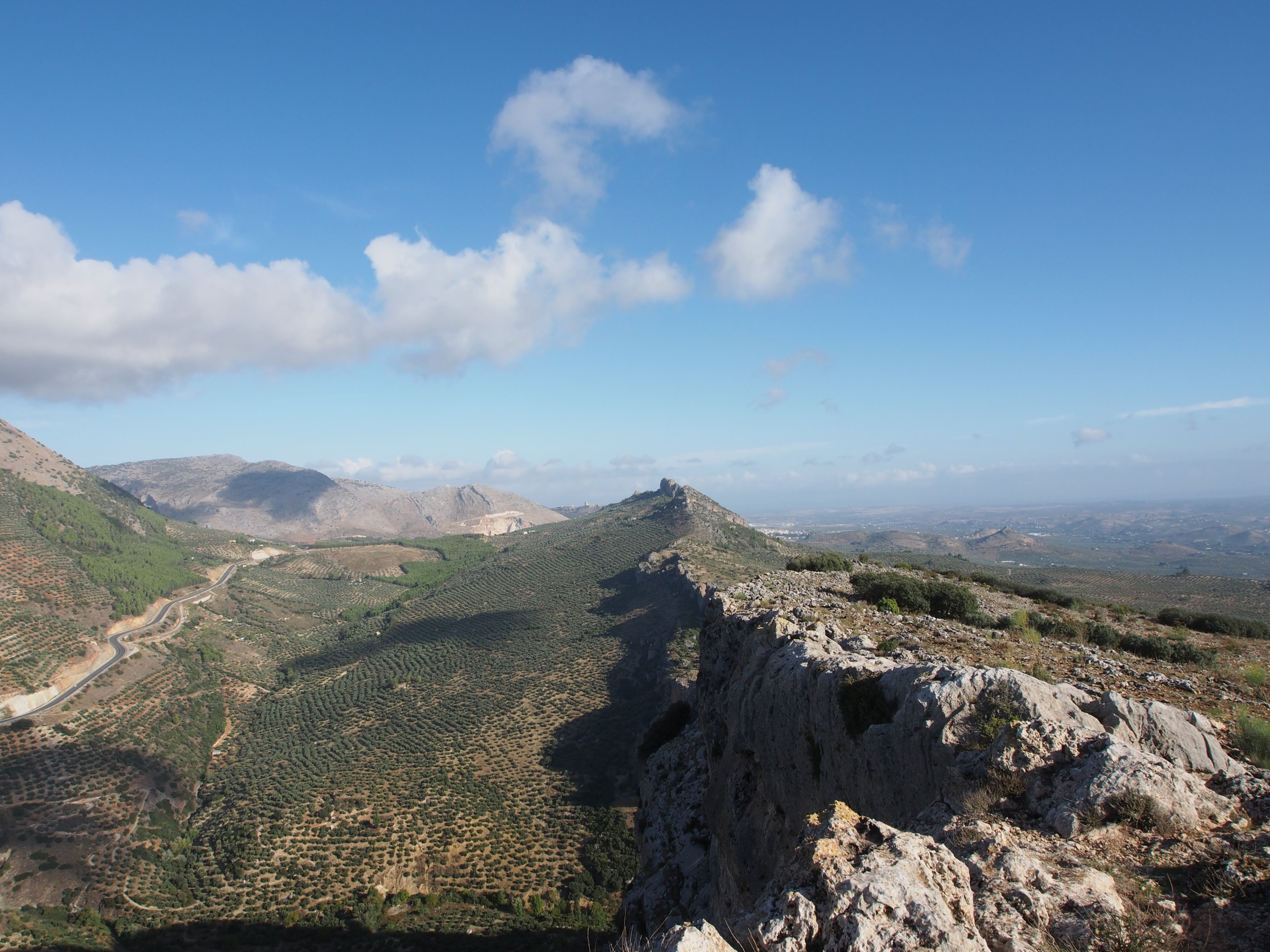 Vista de las Peñas de Castro al fondo y de Las Cimbras, términos municipales de Los Villares y Jaén.